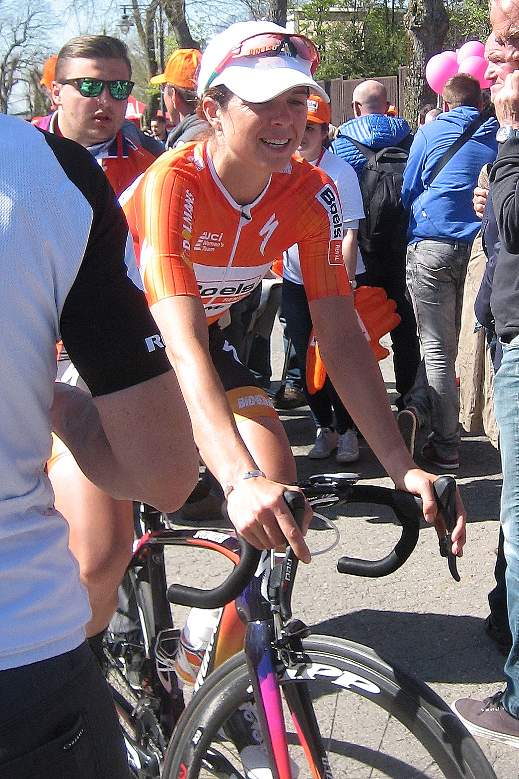 Evelyn Stevens (Boels Dolmans) na finish Waalse Pijl 2016